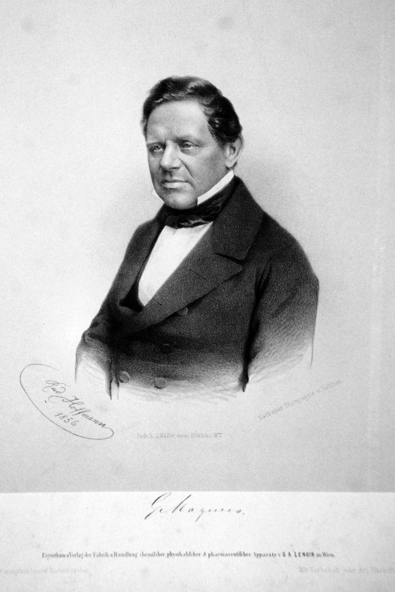 Heinrich Gustav Magnus (1802-1870), deutscher Chemiker und Phsiker. Lithographie von Rudolf Hoffmann, 1856. Nach einer Fotografie von Jagemann